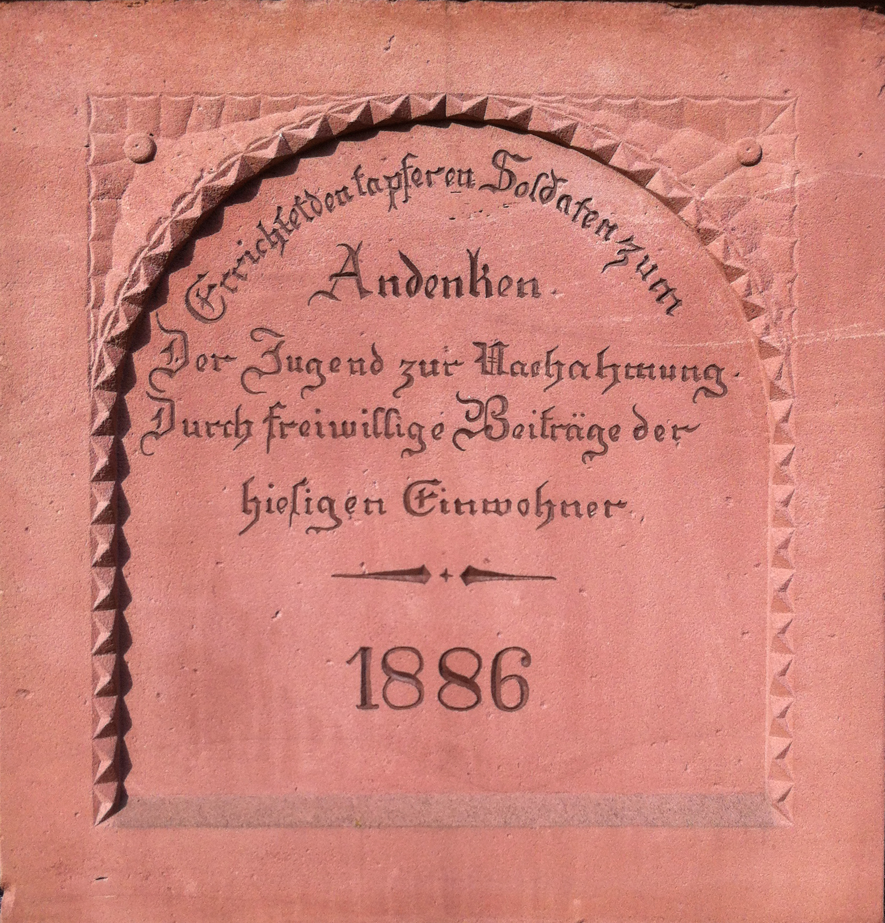 Kriegerdenkmal Eschelbronn